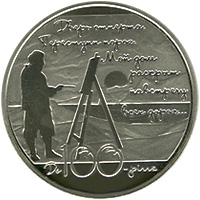 Будинок Поета реверс